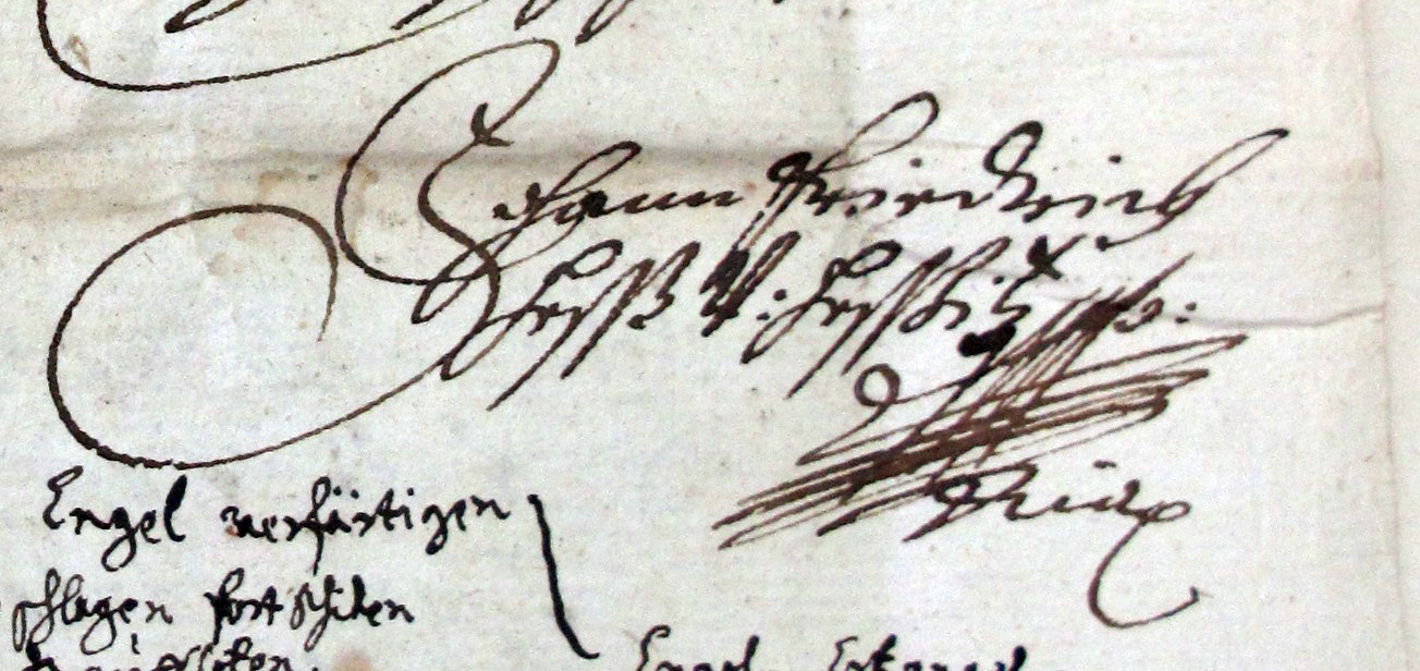 Podpis Jana Bedřicha Hesse z Hessic k 15. 4. 1671